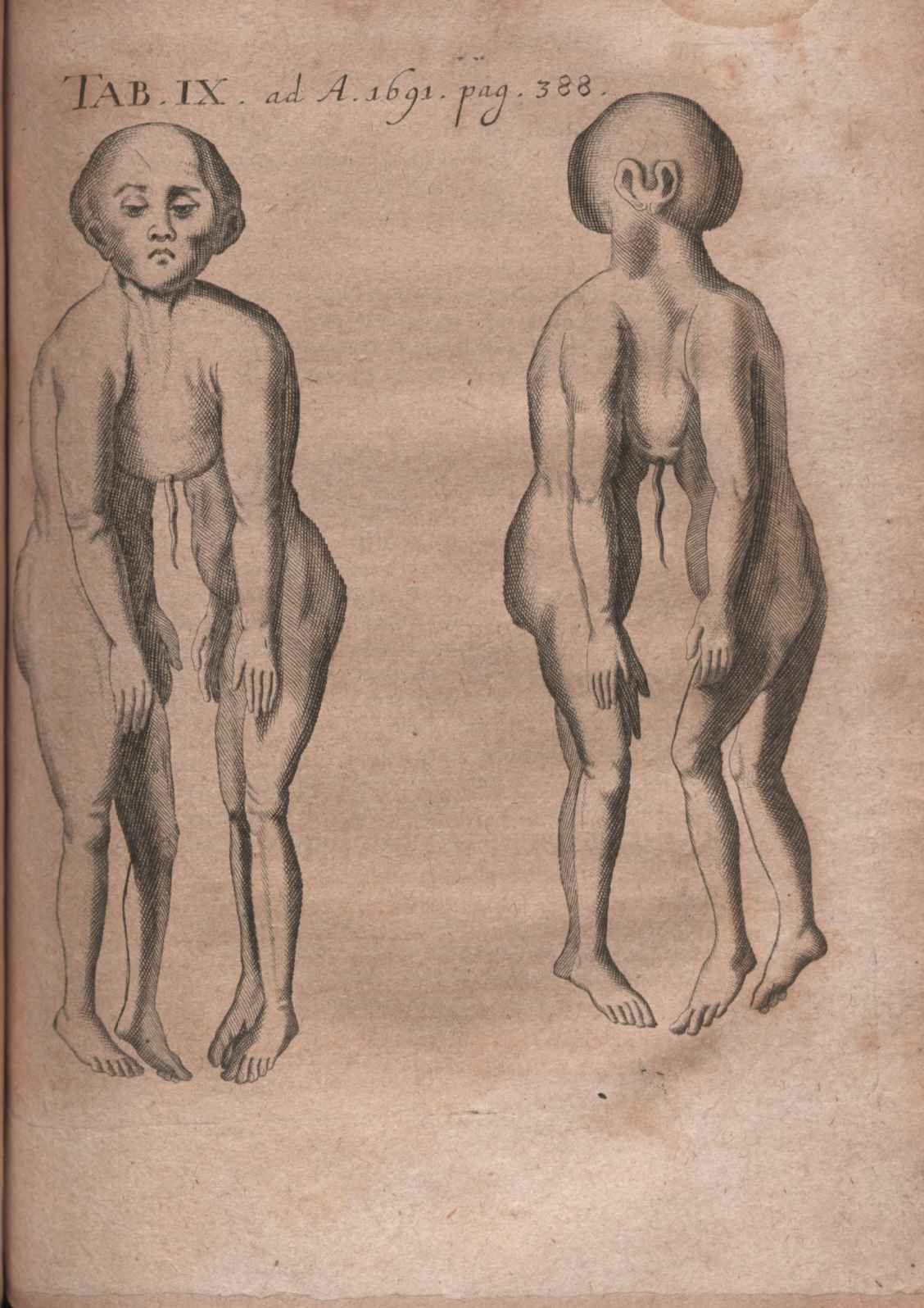 Illustration